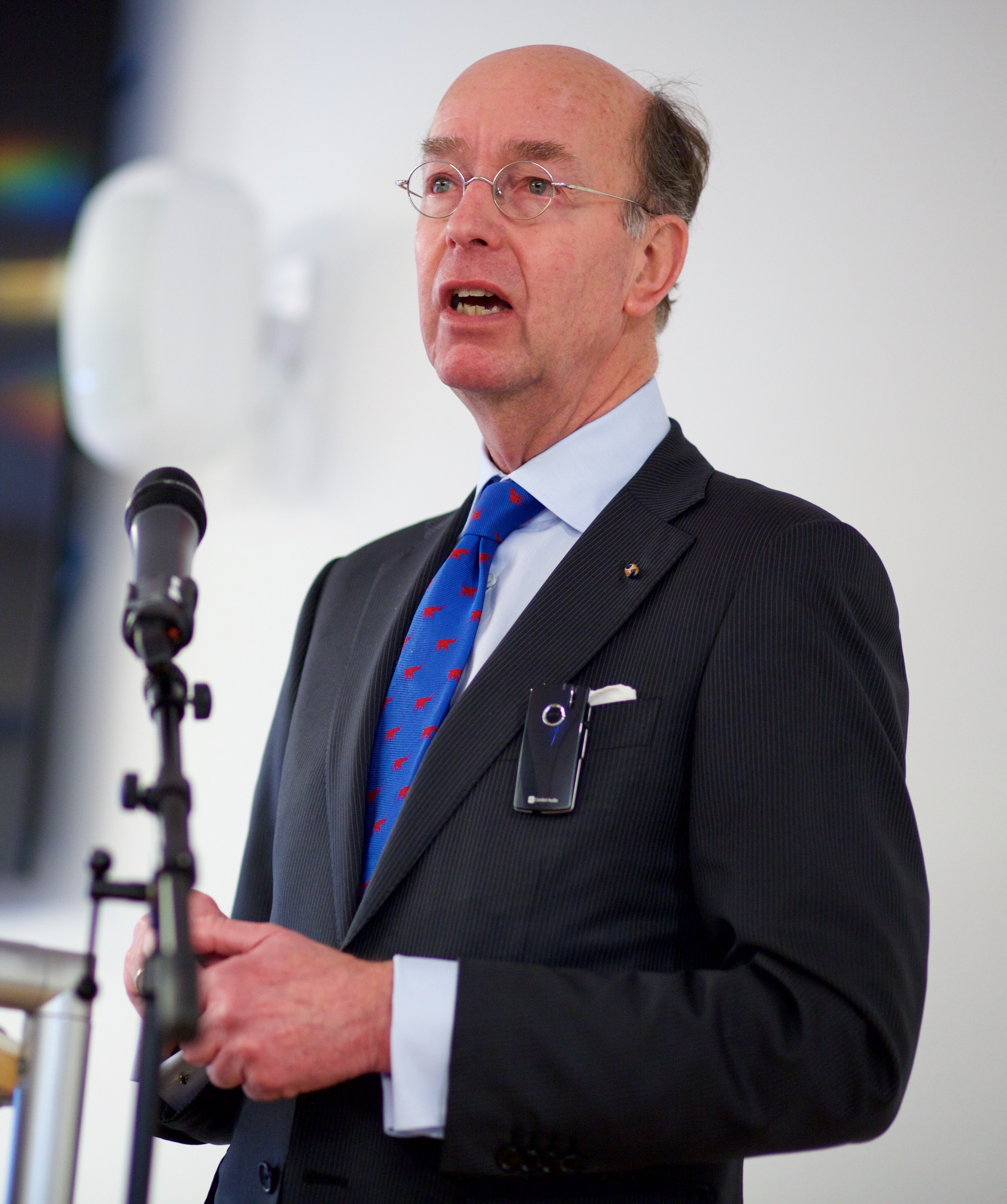 Op 29 januari 2015 organiseerden het Atelier Actieve Openbaarheid, het Nationaal Archief en het Expertisepunt Open Overheid het symposium Actieve Openbaarheid: een Open Aanpak.